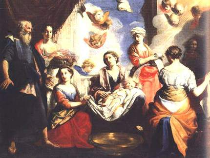 Natividad de la Virgen, Catedral de Gubbio